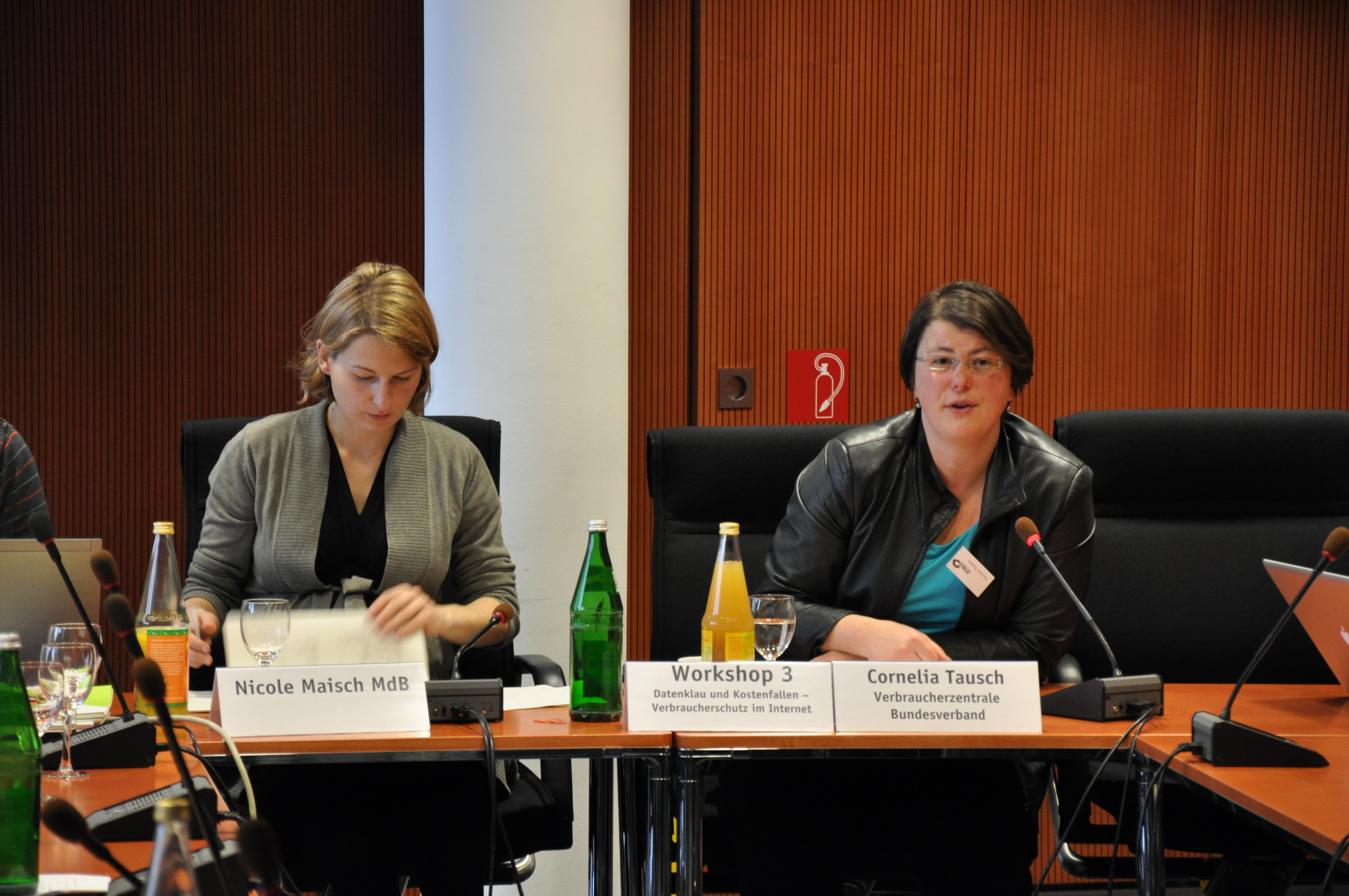 Nicole Maisch, Cornelia Tausch Unter dem Motto "Gesellschaft digital gestalten" versammelte der erste netzpolitische Kongress am 12. und 13. November 2010 über 500 Teilnehmerinnen und Teilnehmer im Deutschen Bundestag. Im Foyer und in den Ausschusssälen des Paul-Löbe-Hauses wurden die zentralen Fragen der Informationsgesellschaft engagiert diskutiert.